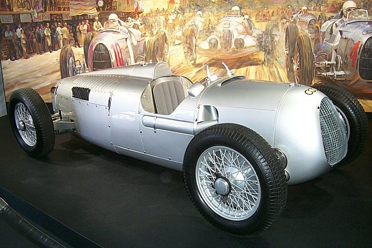 p9